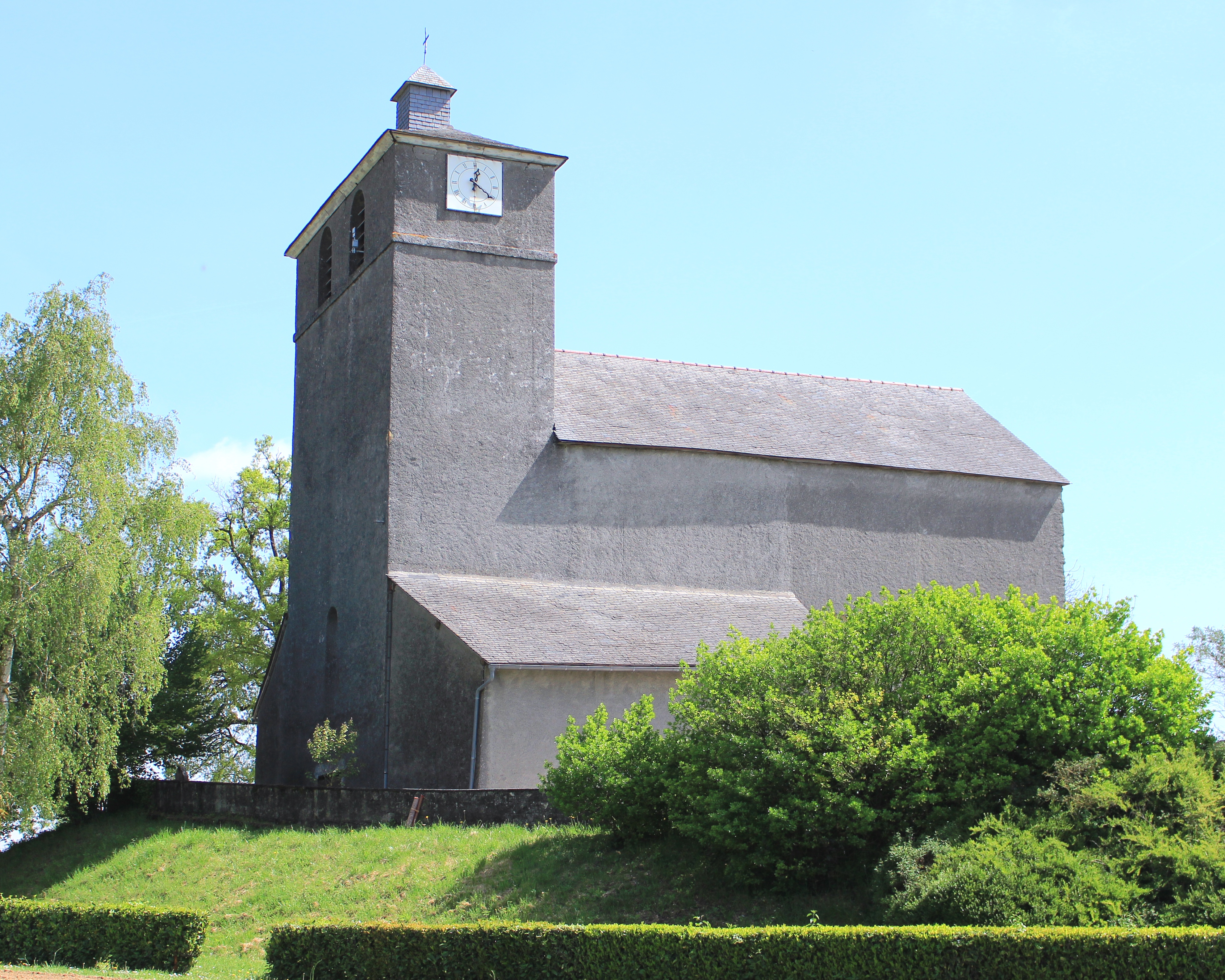 Église Saint-Michel de Séron (Hautes-Pyrénées)